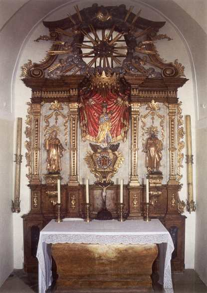 Foto von Johannes Hartl